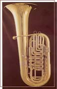 Tuba in F Bildquelle Firma: Rudolf Meinl. Inhaber hat GNU-FDL zugestimmt.